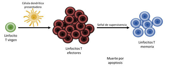 Generacion de linfocitos T de memoria